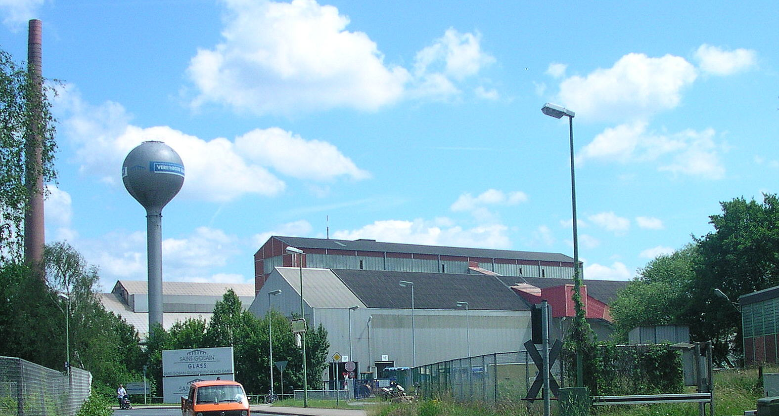 Stolberg, Saint-Gobain (VEGLA)